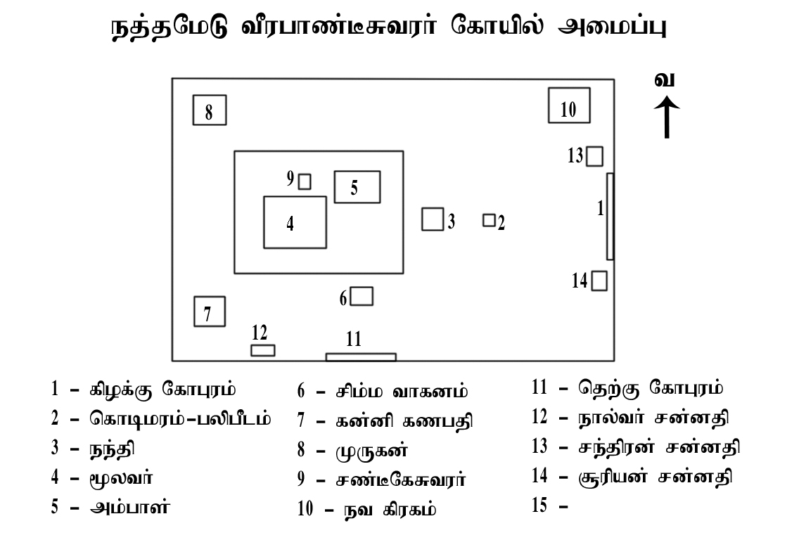 நந்தமேடு வீரபாண்டீசுவரர் கோயில் அமைப்பு